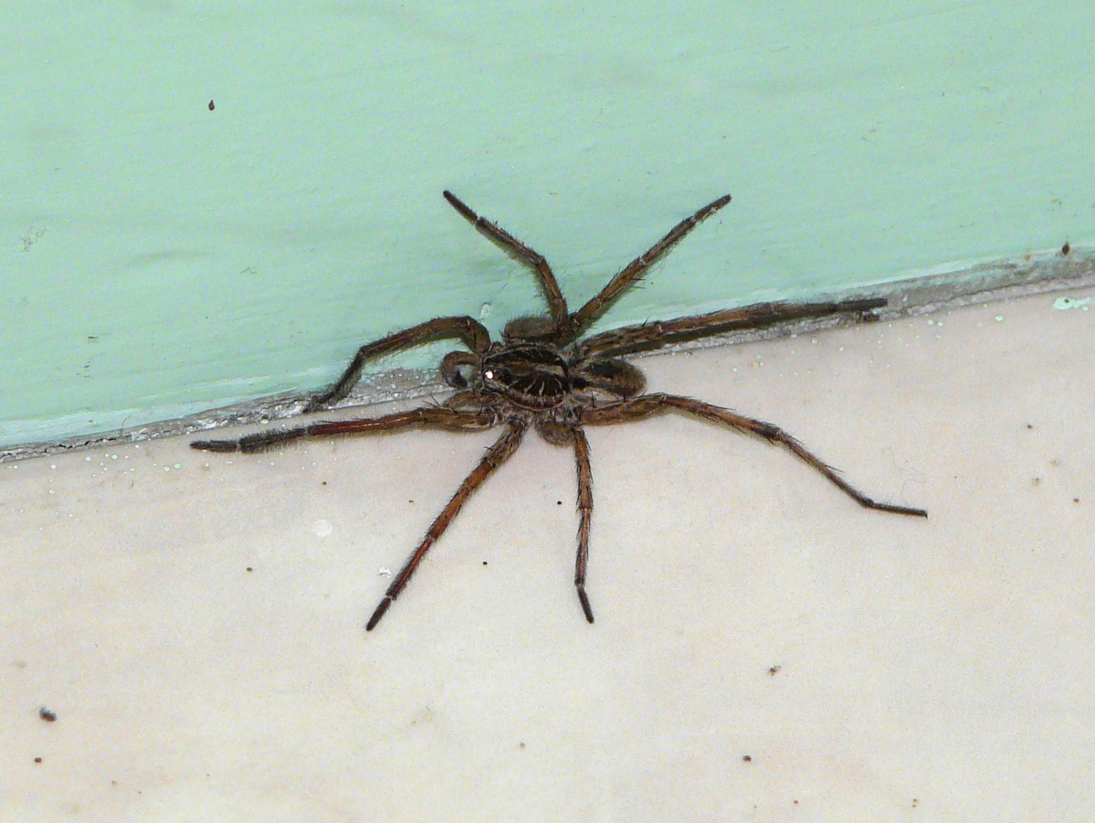 Tarentule radiée (Hogna radiata), Périgueux, Dordogne, France.